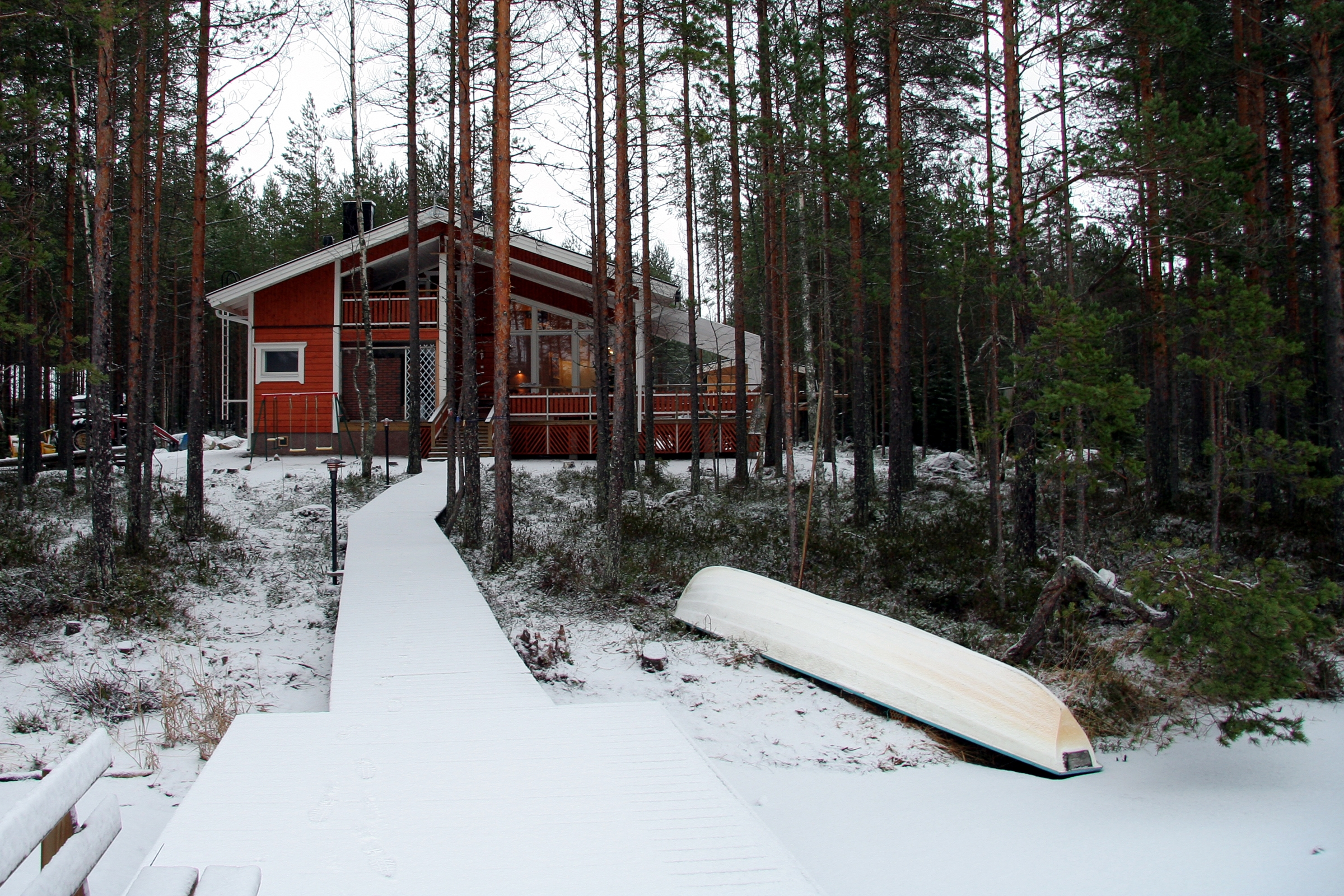 Mökki in Finland